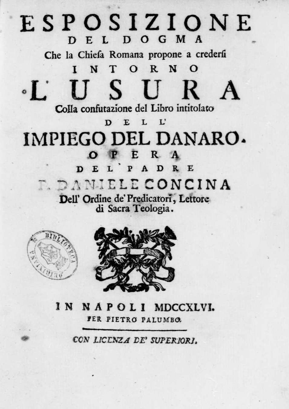 Frontespizio